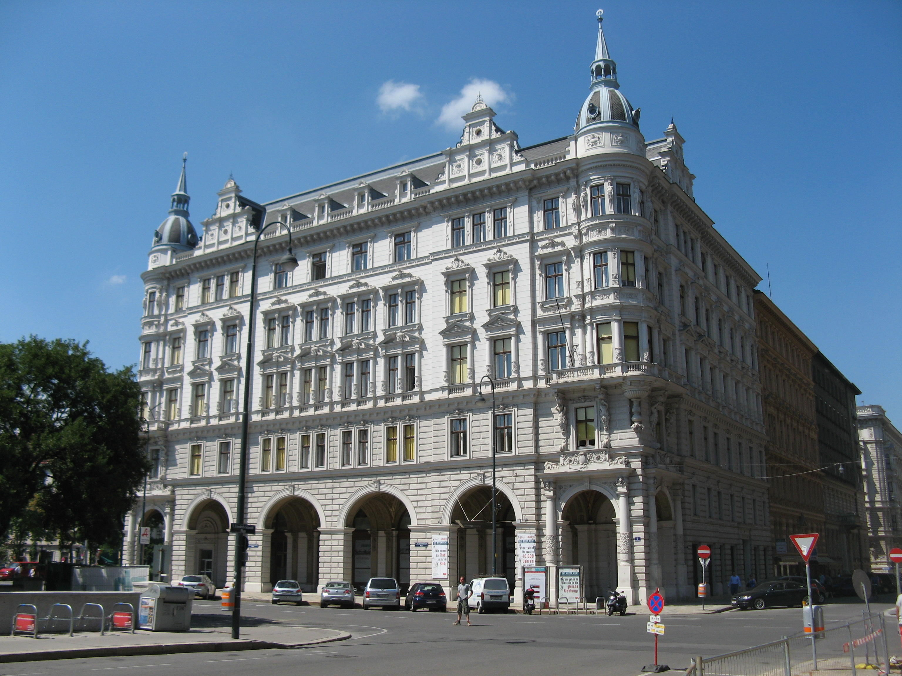 Arkadenhaus (1882-83) von Ladislaus Boguslawski, Friedrich-Schmidt-Platz 8-9, Wien-Innere Stadt